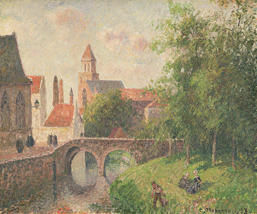 Sleutelbrug over de Speelmansrei in Brugge, België